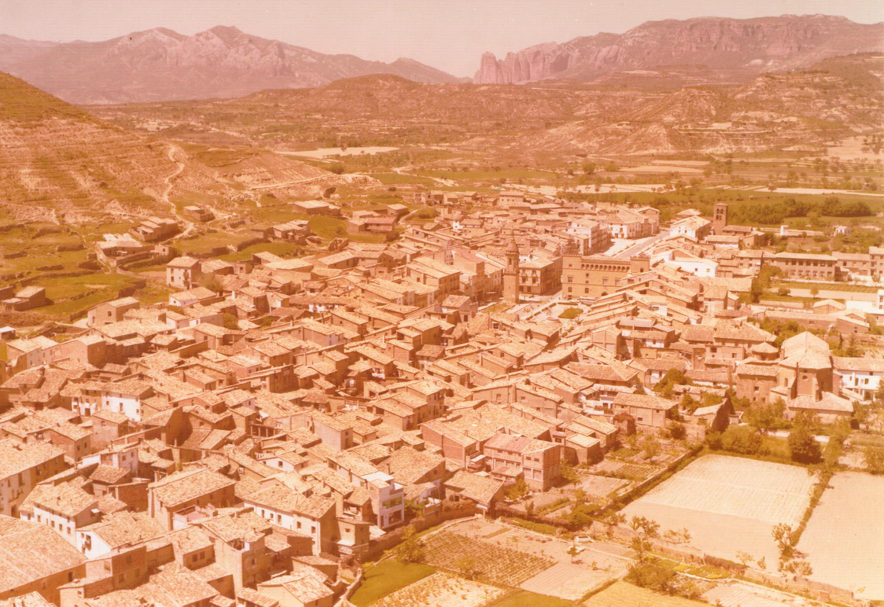 Ayerbe vista aerea